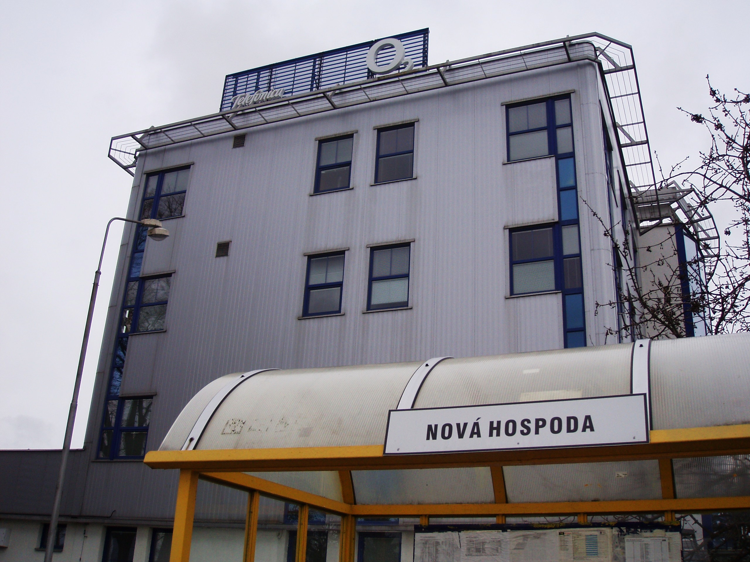 Nová Hospoda - budova O2